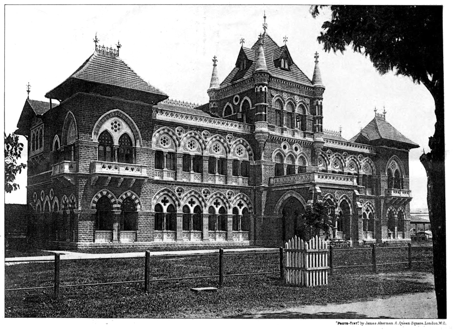 Cama Hospital. Bombay in 1887.